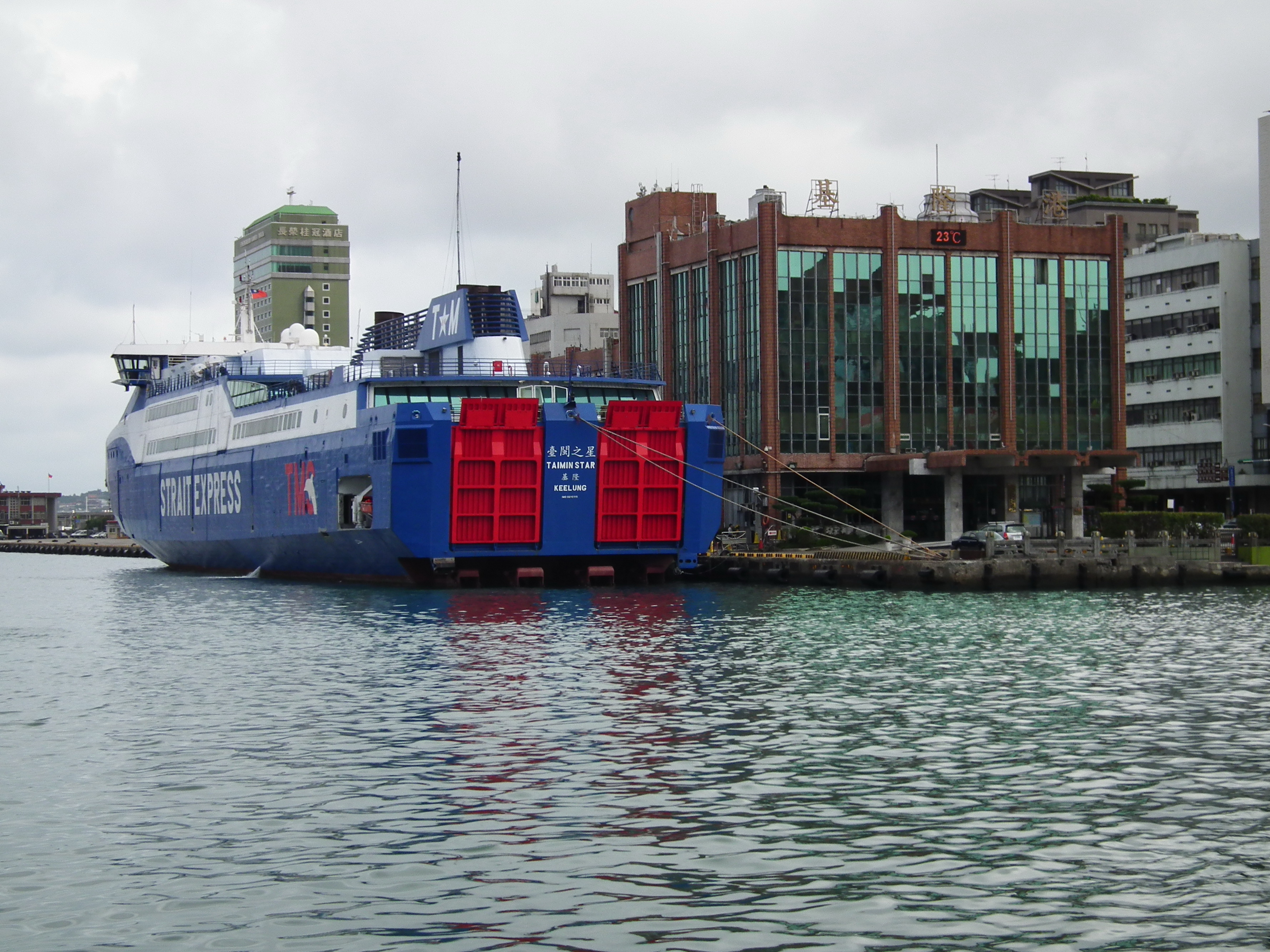 臺閩之星停泊基隆港東岸。